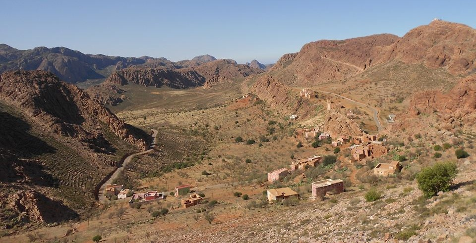 Vue Panoramique de Taltemsen